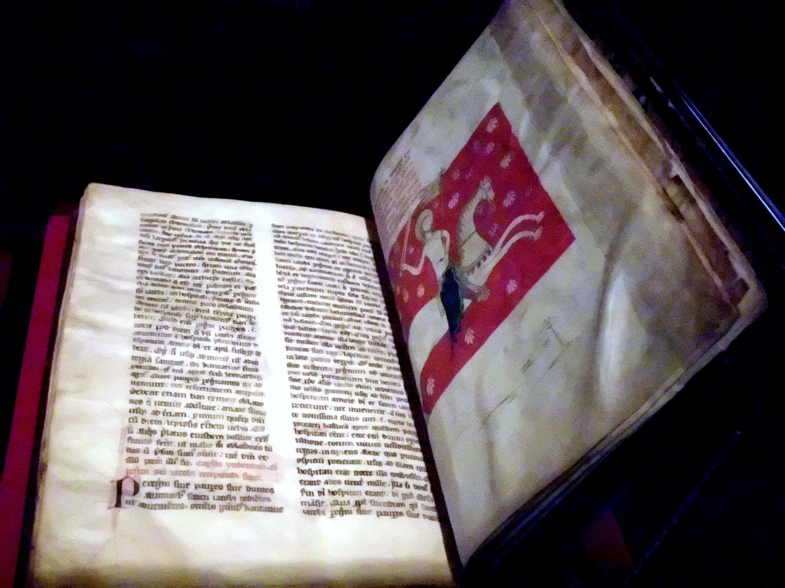 Exposto na Cidade da Cultura, na mostra Ex Libris Gallaeciae, comisariada polo rianxeiro Axeitos e o ribeirense Barreiro.